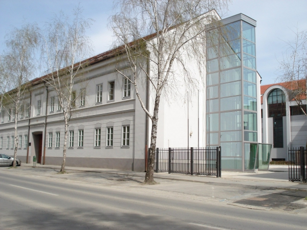 Main building KBF